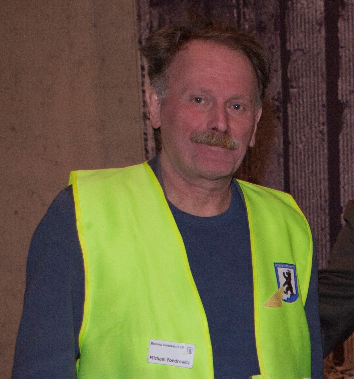 Michael Foedrowitz in August 2015